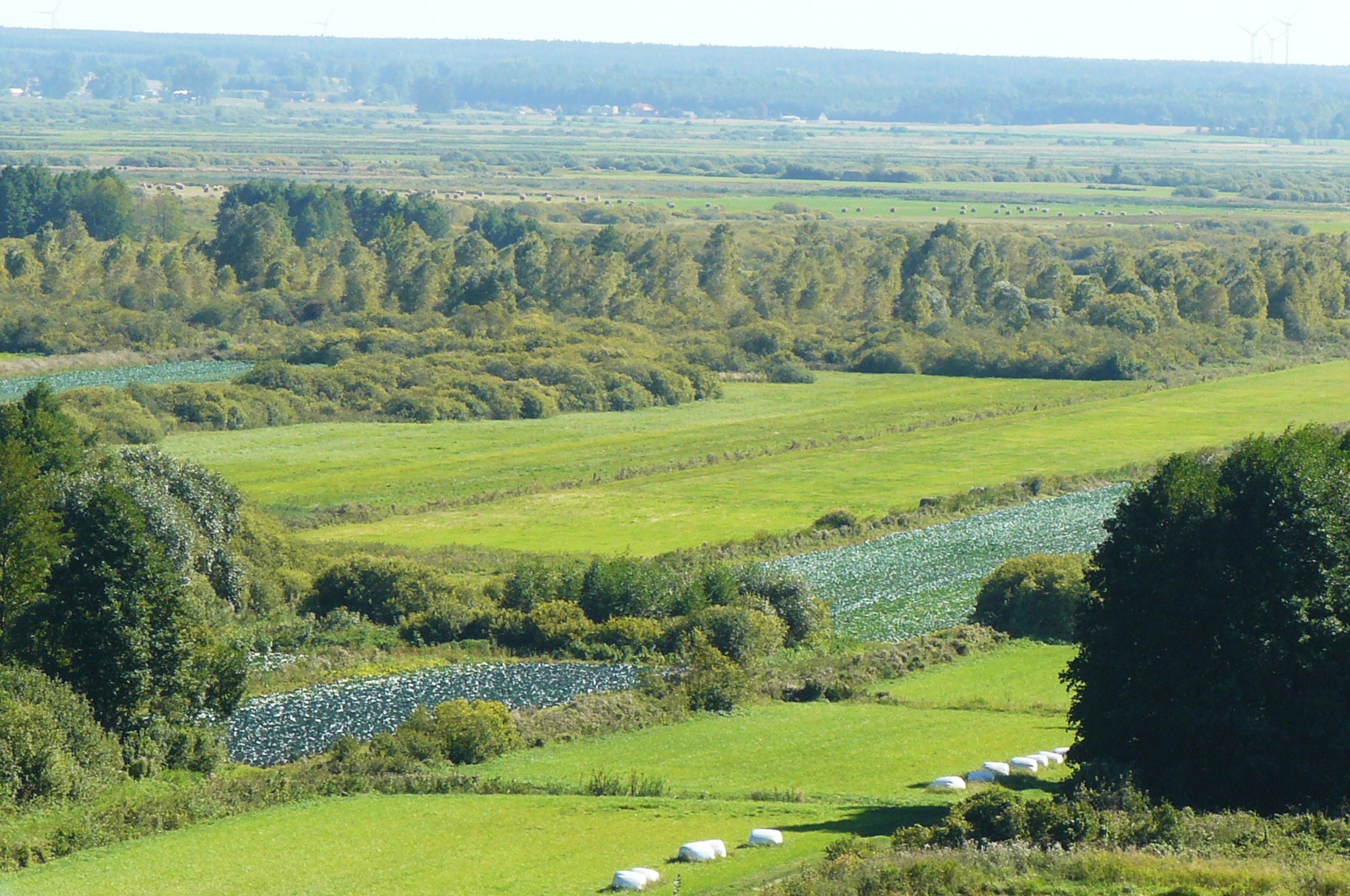 Dolina Noteci w rejonie Morzewa.